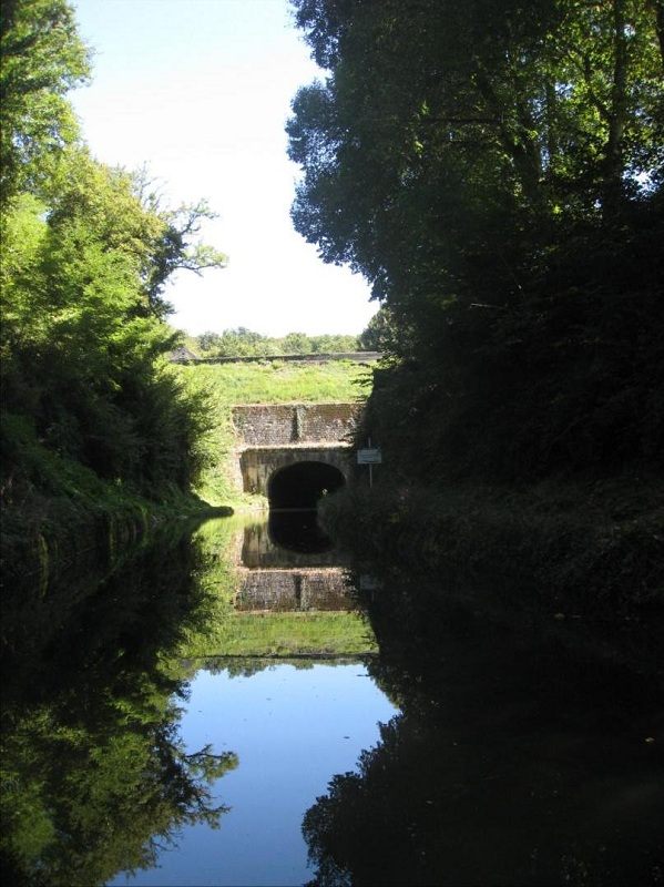 Les voûtes de La Collancelle